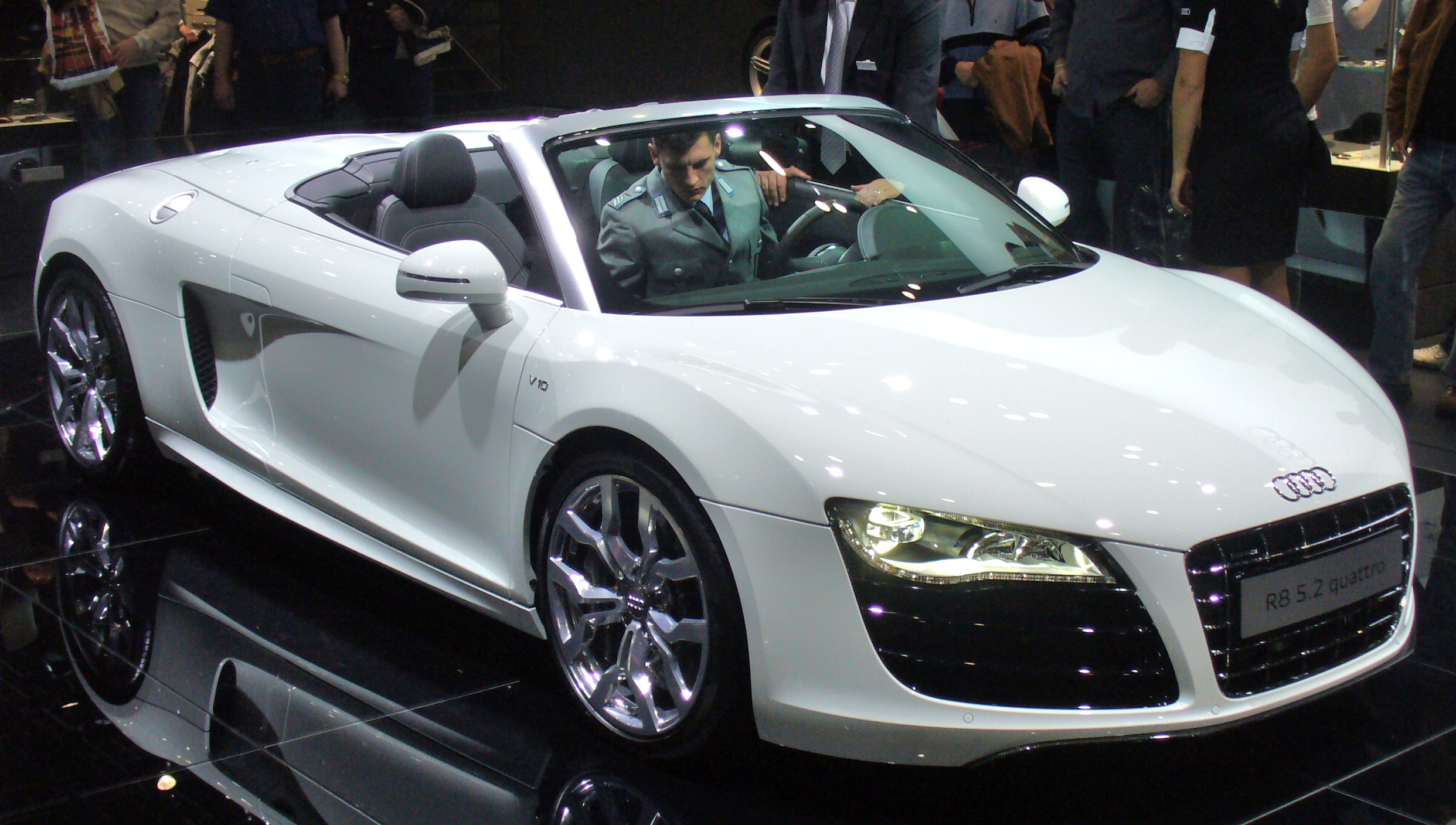 Audi R8 Spyder